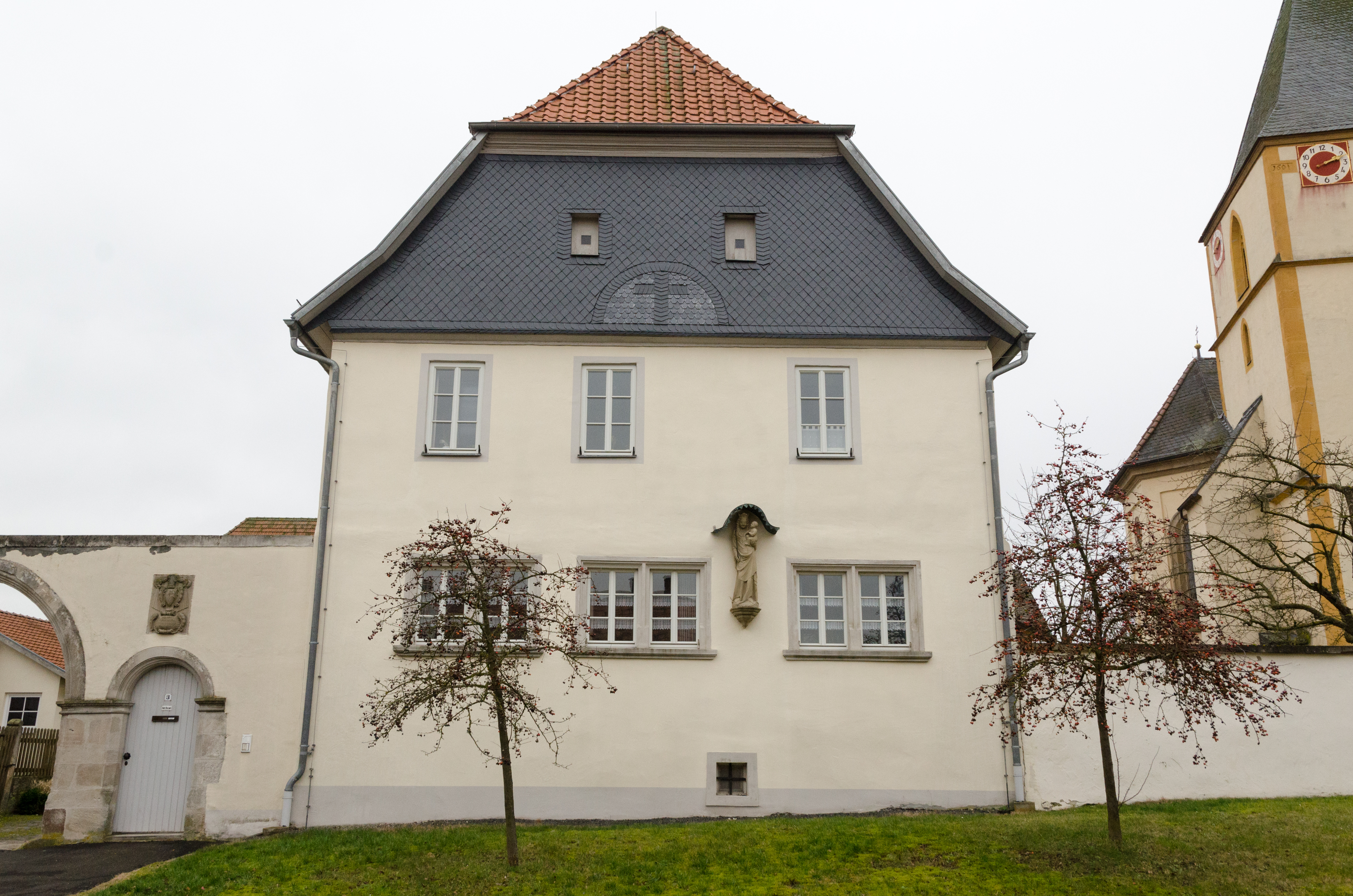 Bad Königshofen im Grabfeld, Merkershausen, Obere Gasse 3